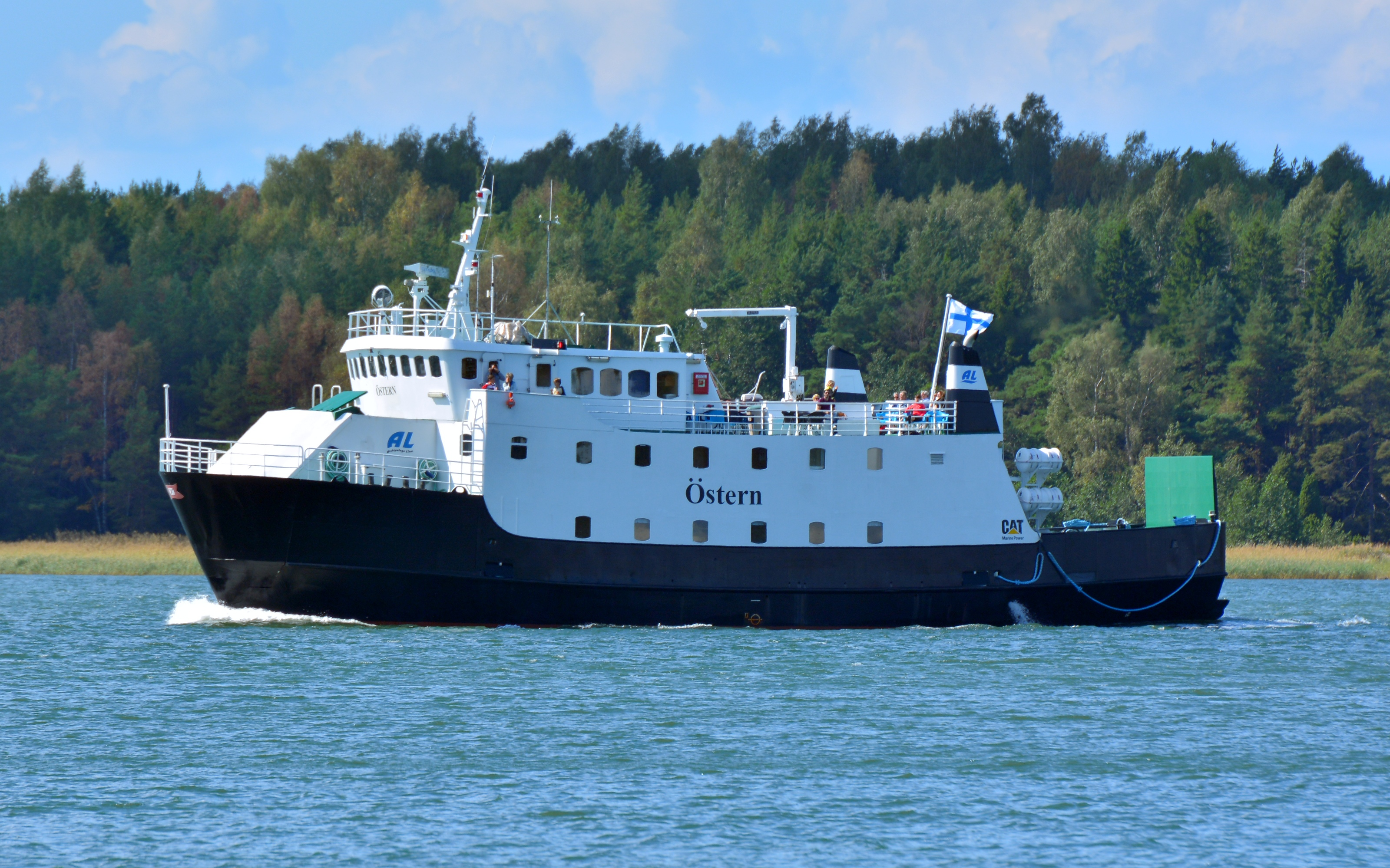 M/S Östern|M/S Östern